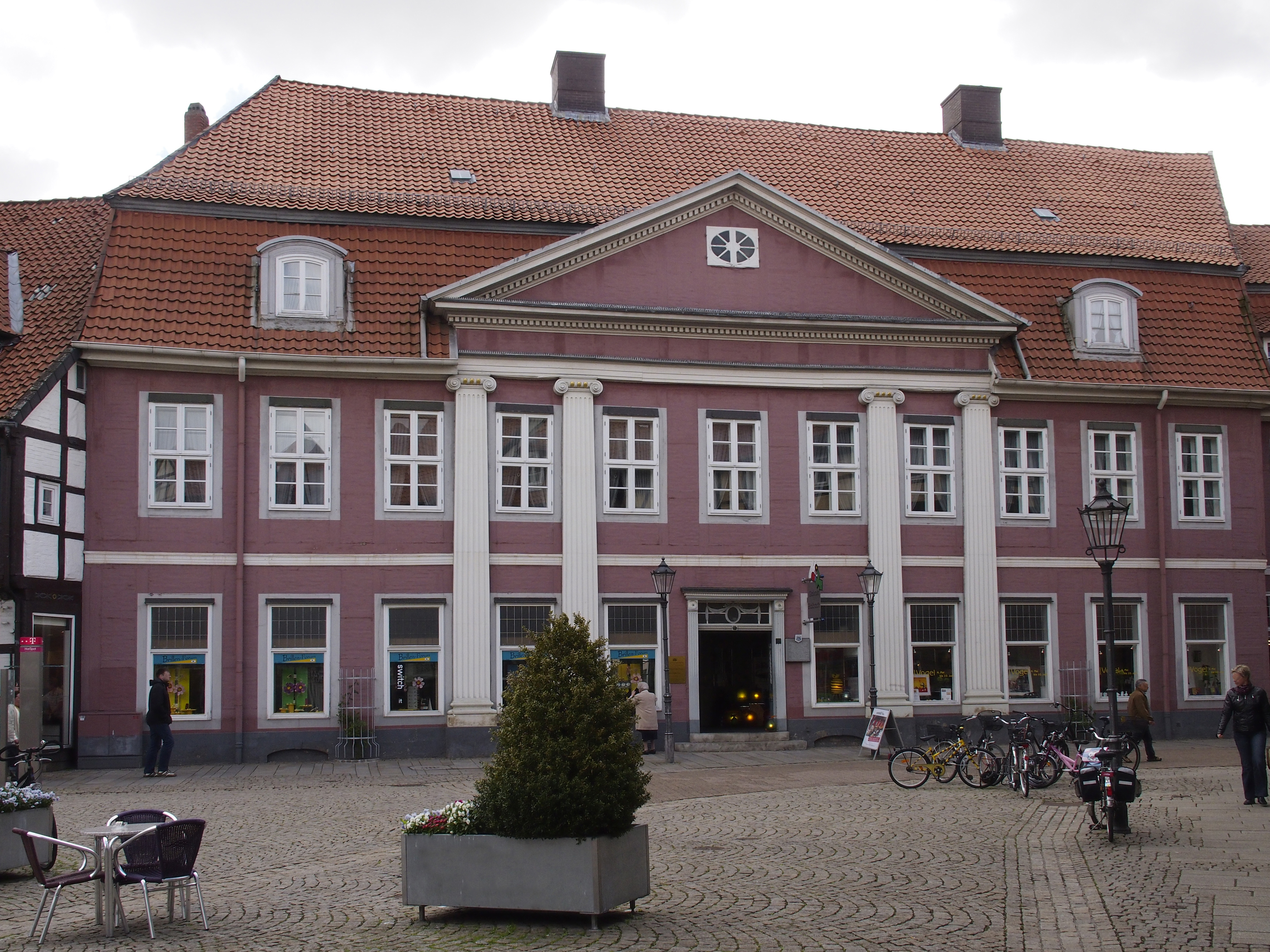 Stechinellihaus Celle, Niedersachsen, Germany